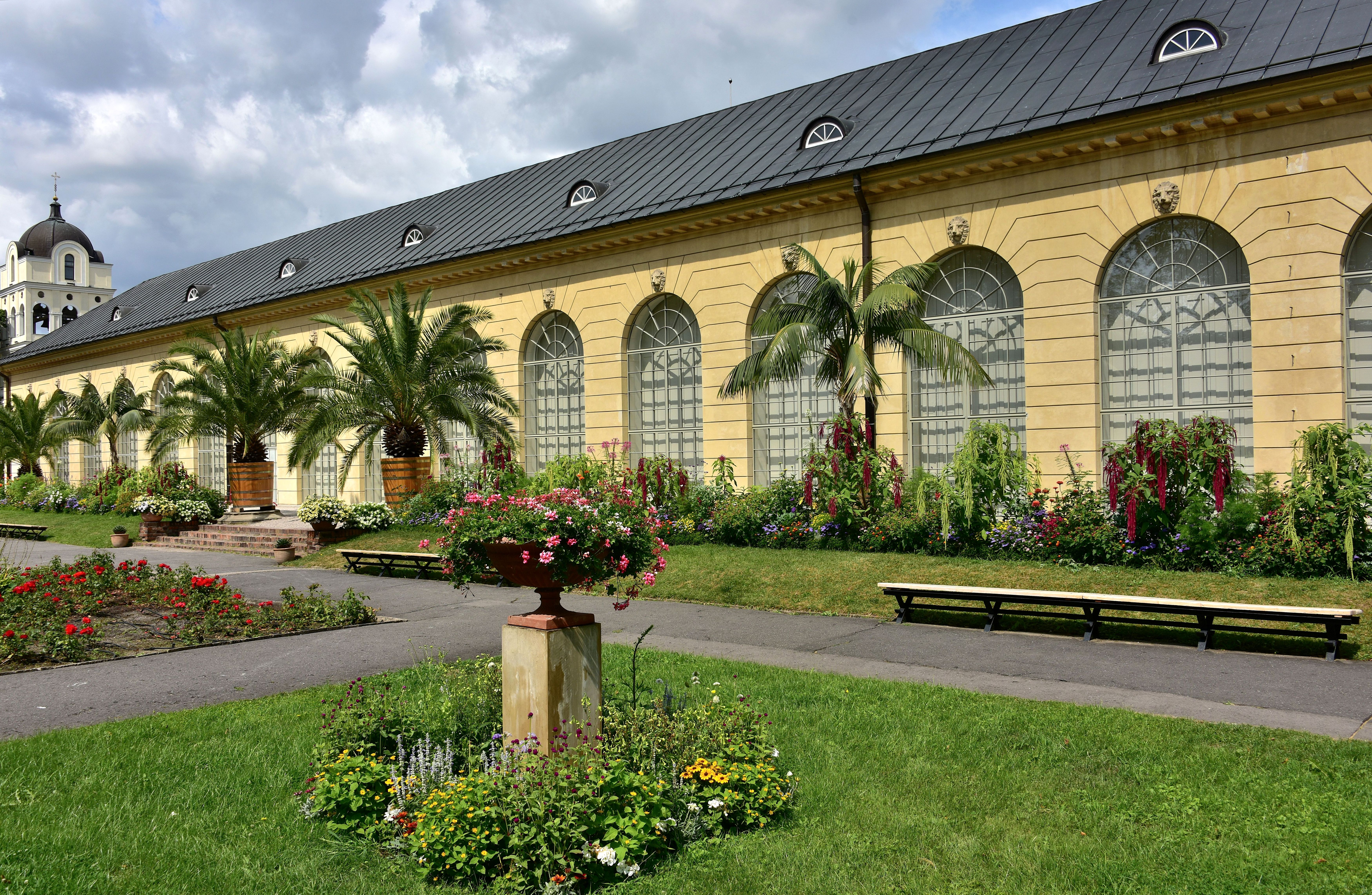 Oranżeria w Ogrodzie w Wilanowie w Warszawie